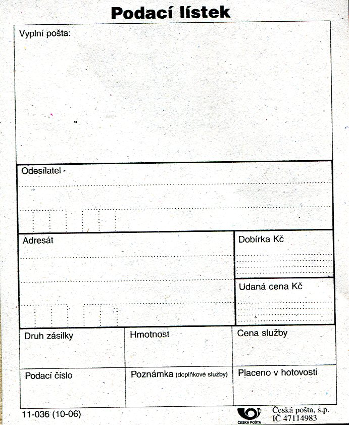 Podací lístek - uřední dokument České Pošty.